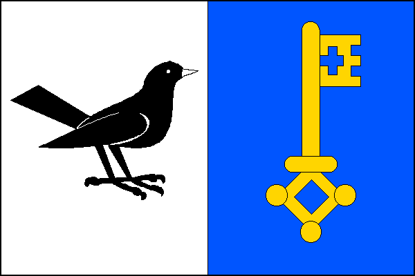 vlajka, Chvaleč, okres Trutnov